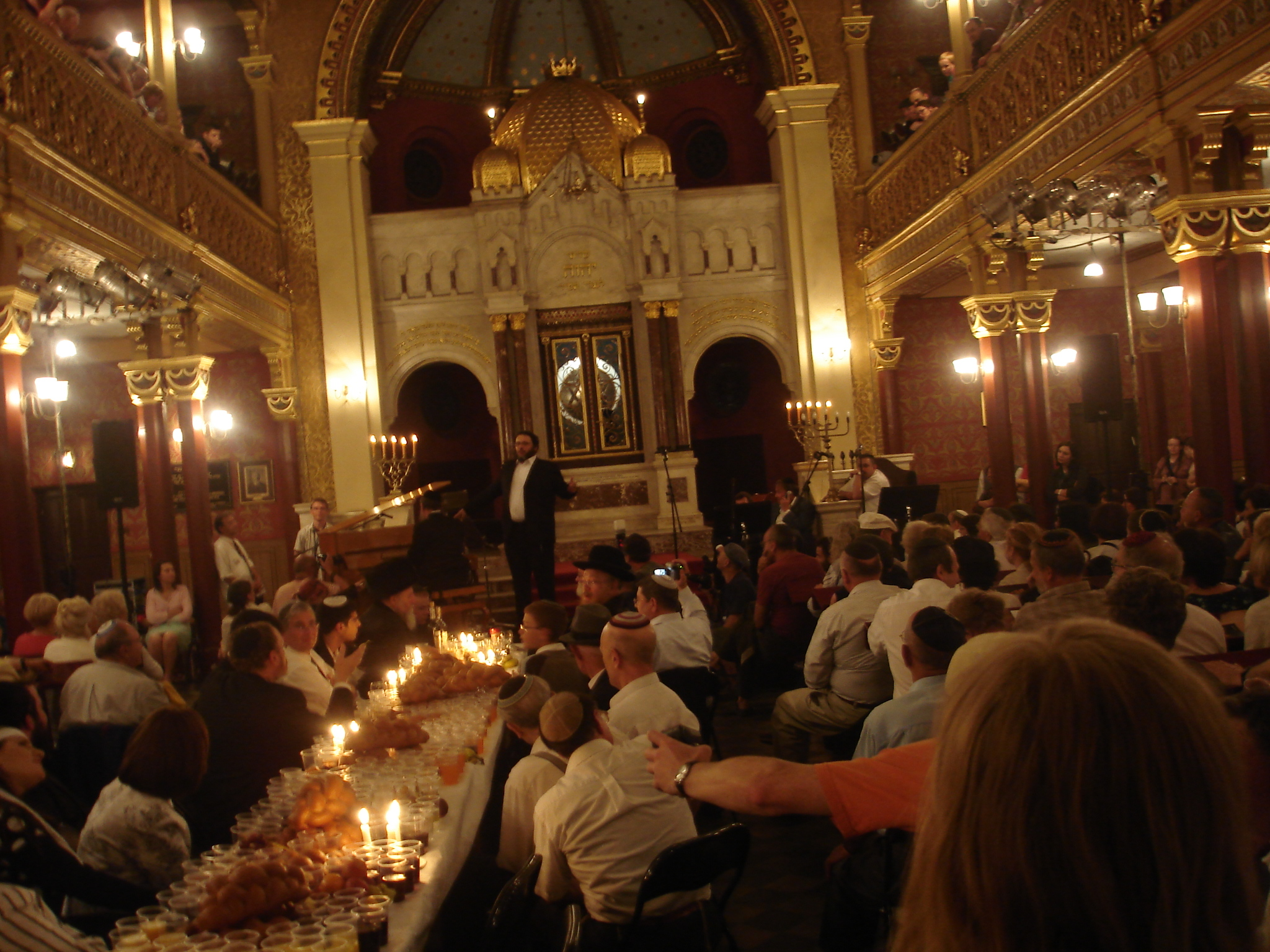 Melawe Malke in Tempel Synagogue, Krakow